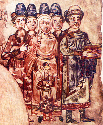 Святослав (крайний справа) с семьёй.